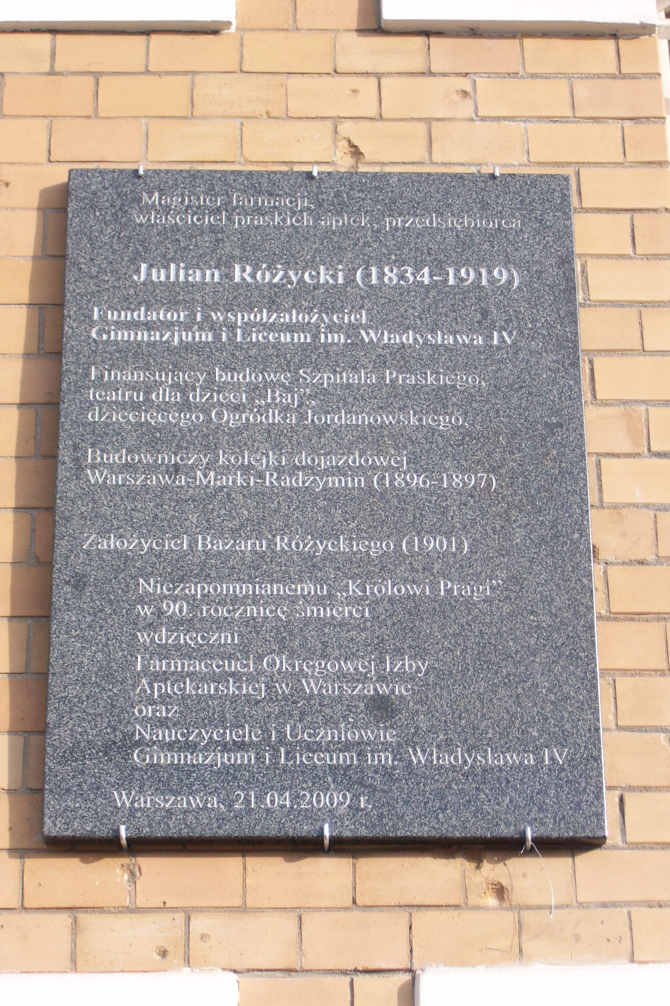 Tablica na budynku VIII LO od strony al. "Solidarności"